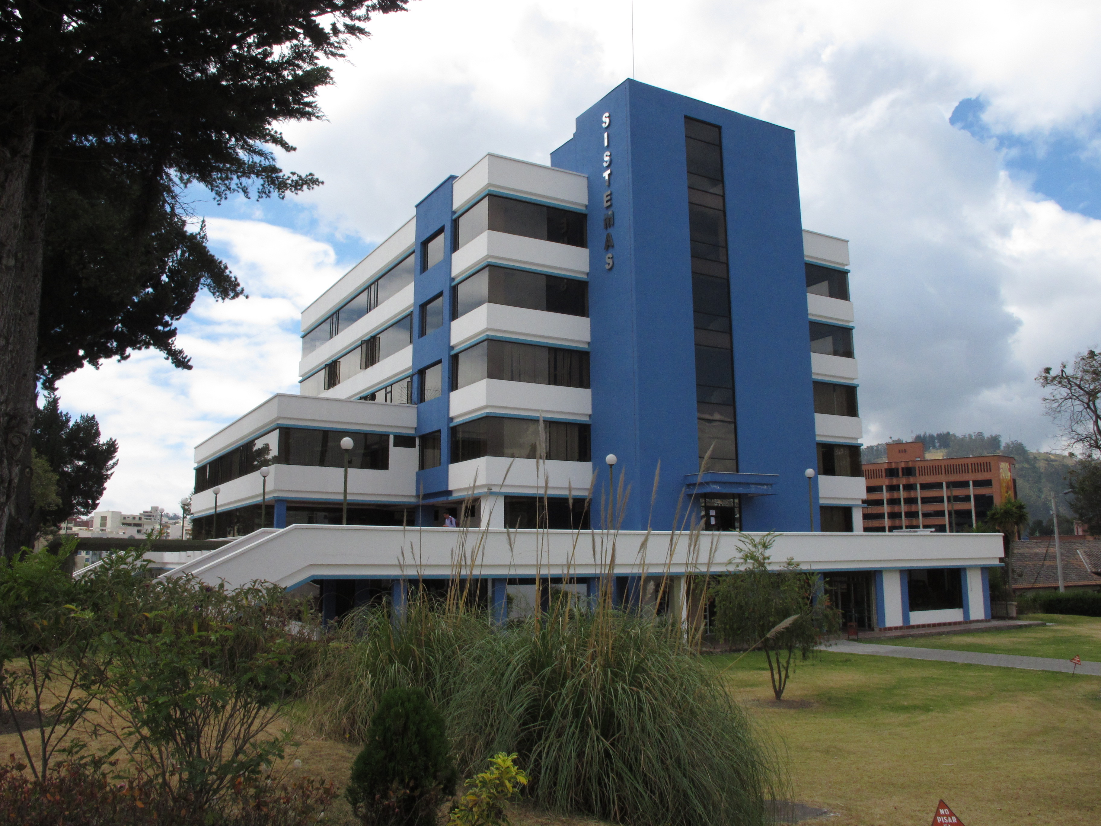 Facultad de Sistemas, Escuela Politécnica Nacional Quito, Ecuador.